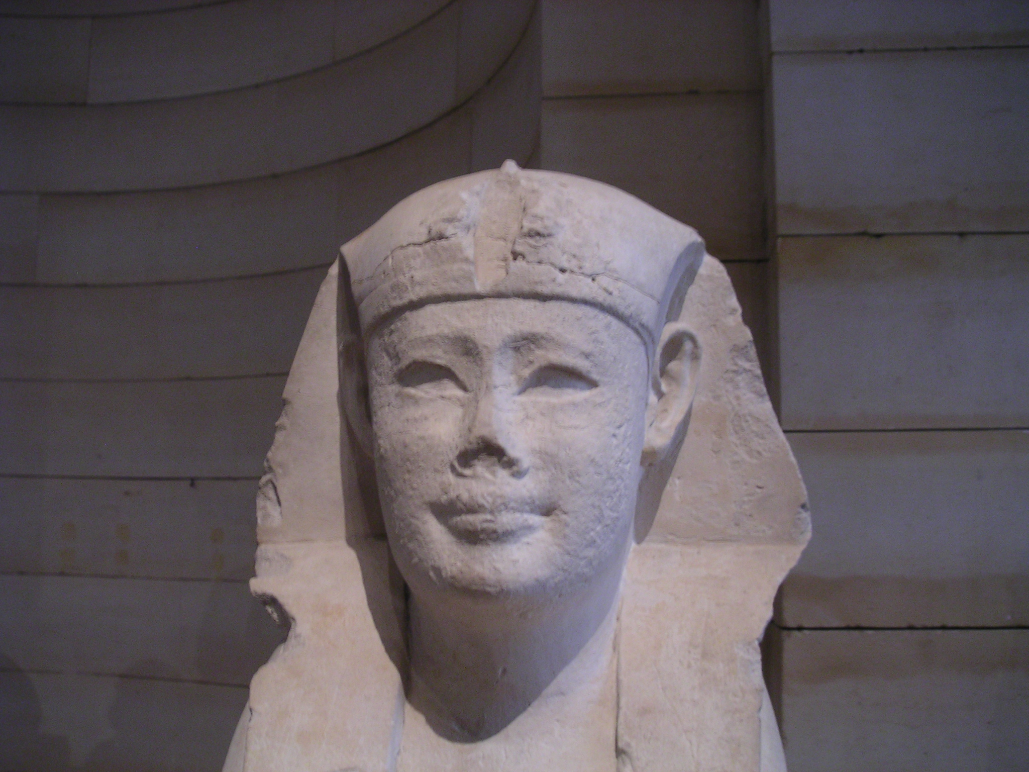 Sphinx du Sérapéum de Saqqarah - Basse Epoque - Musée du Louvre